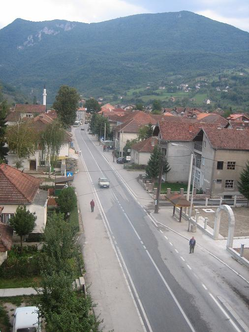 Glavna ulica Brodareva iz pticije perspektive